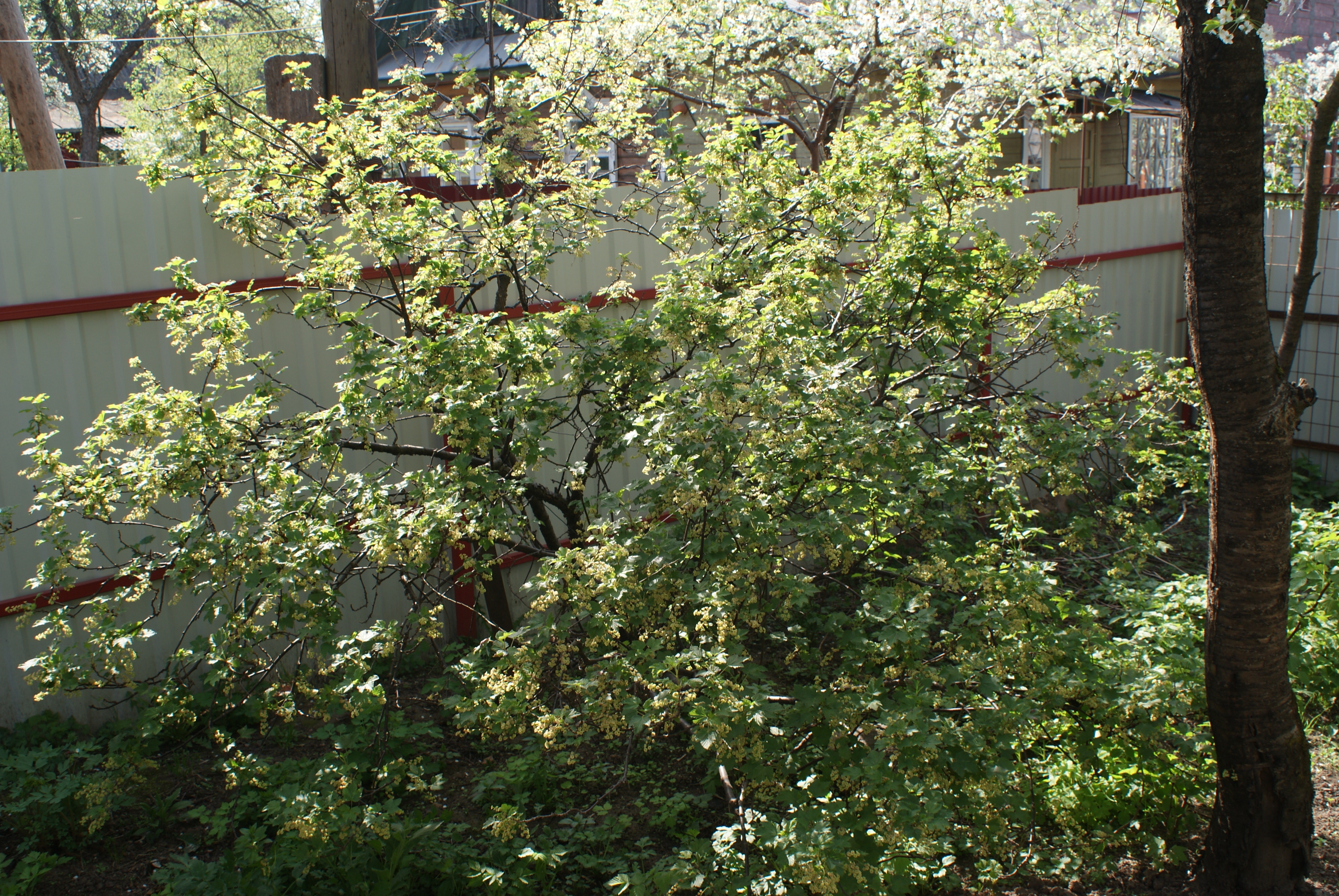 Куст квітнеючых чырвоных парэчак